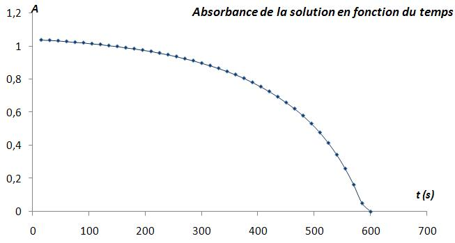 Absorbance d'une solution de permanganate et d'acide oxalique en fonction du temps